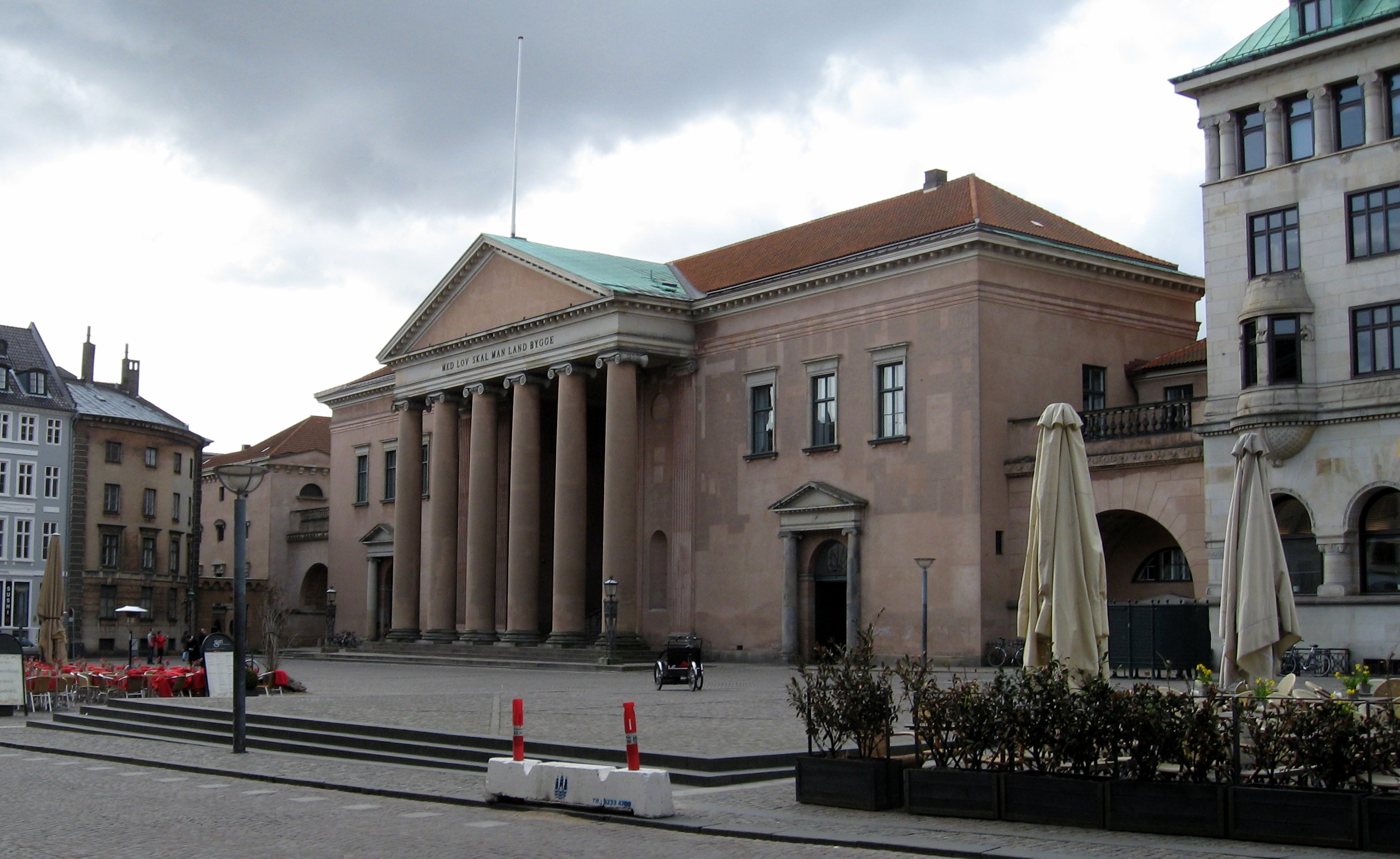 Københavns Domhus